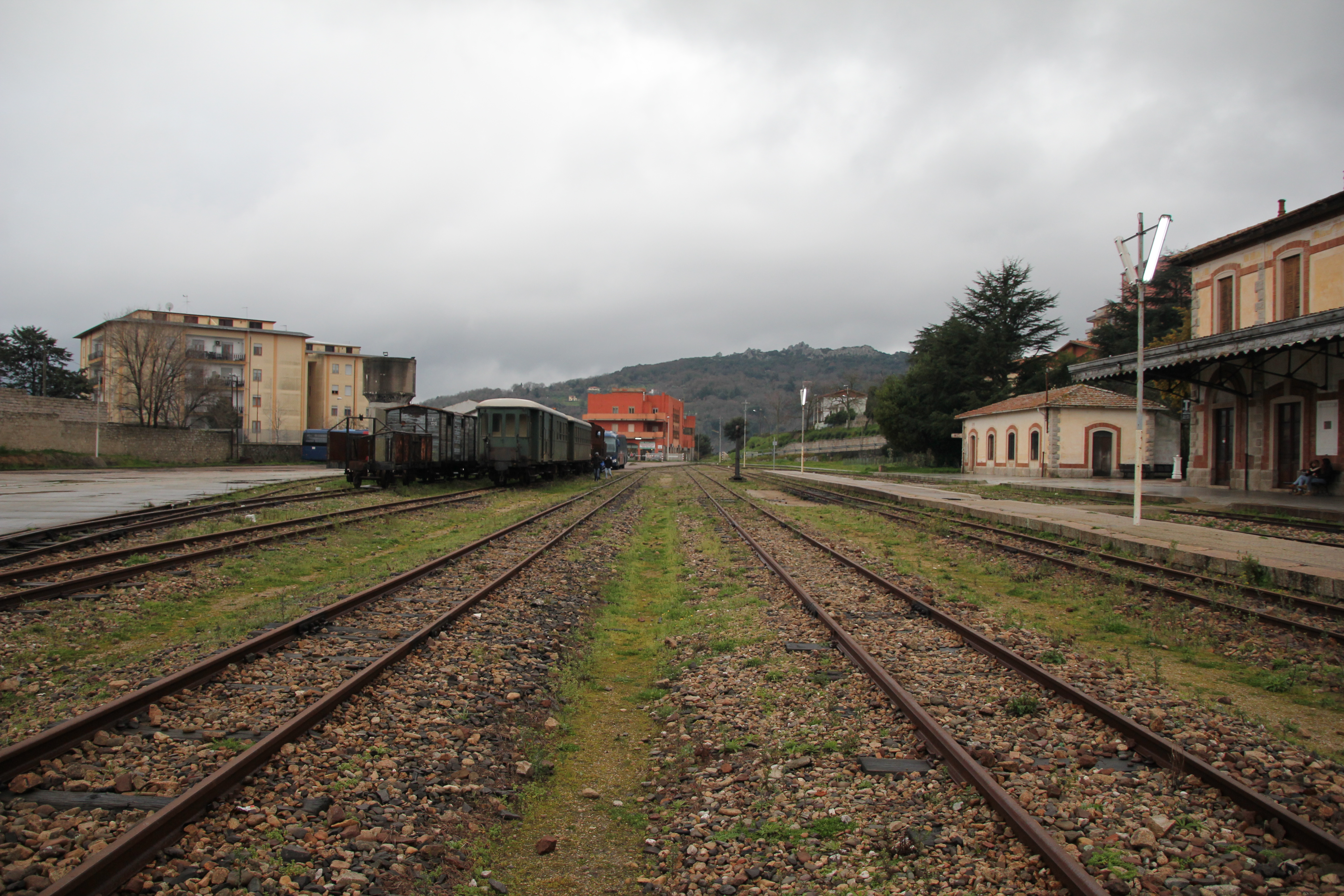 Tempio Pausania - Stazione ferroviaria